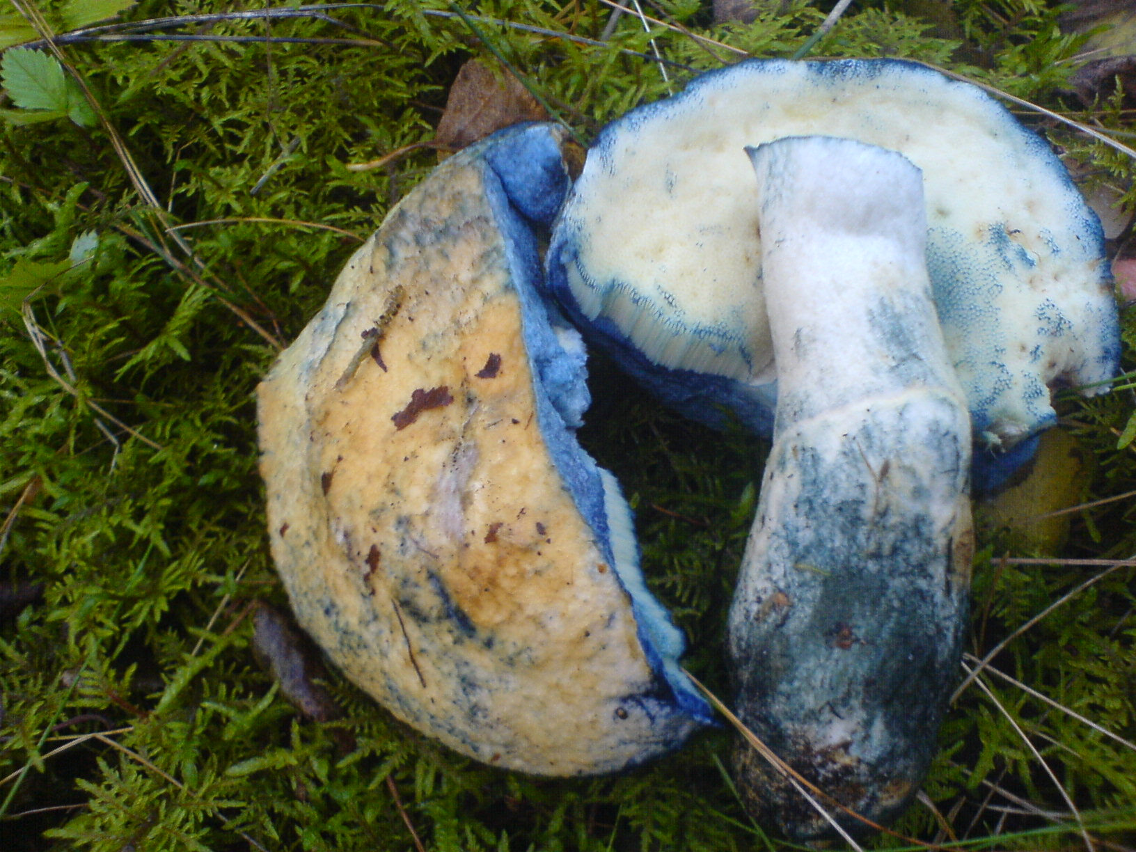 Piaskowiec modrak